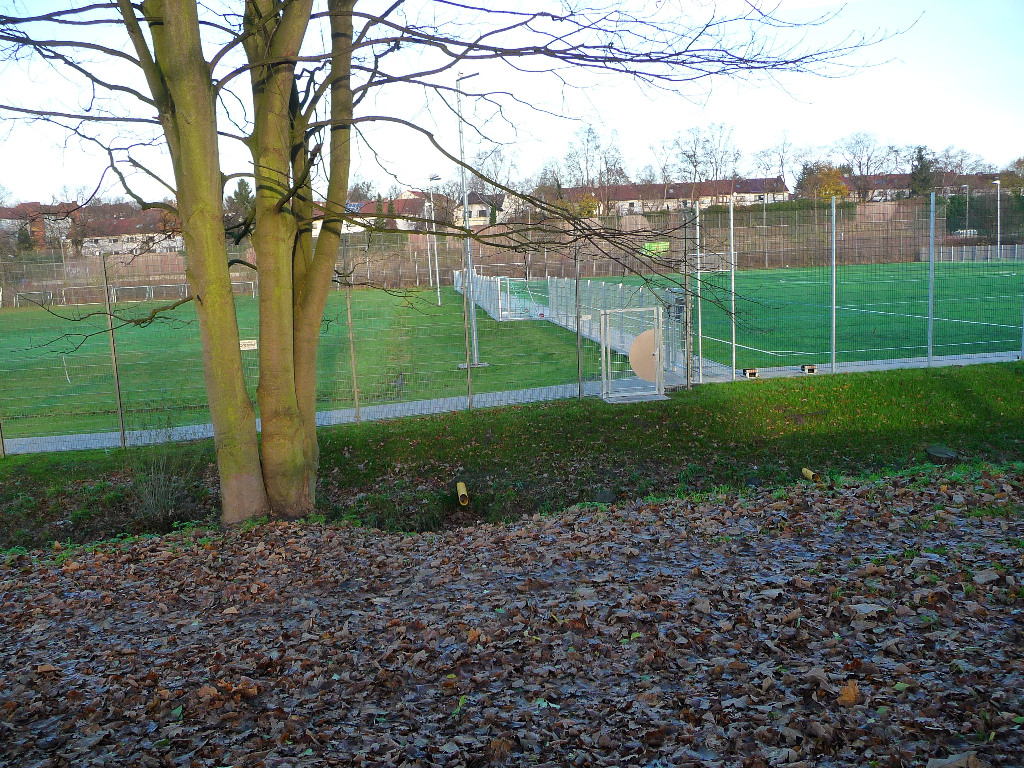 Links Naturrasenplatz, rechts Kunstrasenplatz, fotografiert im Bremer Stadtteil Lesum (Deutschland)